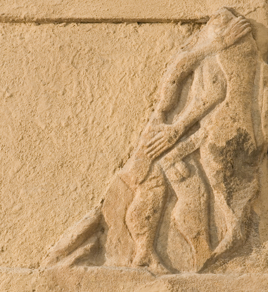 Sillar de arenisca perteneciente al primer cuerpo del Monumento con escena de hierogamia. Monumento de Pozo Moro (Relieve) (Cultura ibérica). Finales del siglo VI a. C. Procedencia: Necrópolis de Pozo Moro (Chinchilla de Monte-Aragón, Albacete). Monumento turriforme. Primer cuerpo (hilada 6) Número de inventario: 1999/76/3.